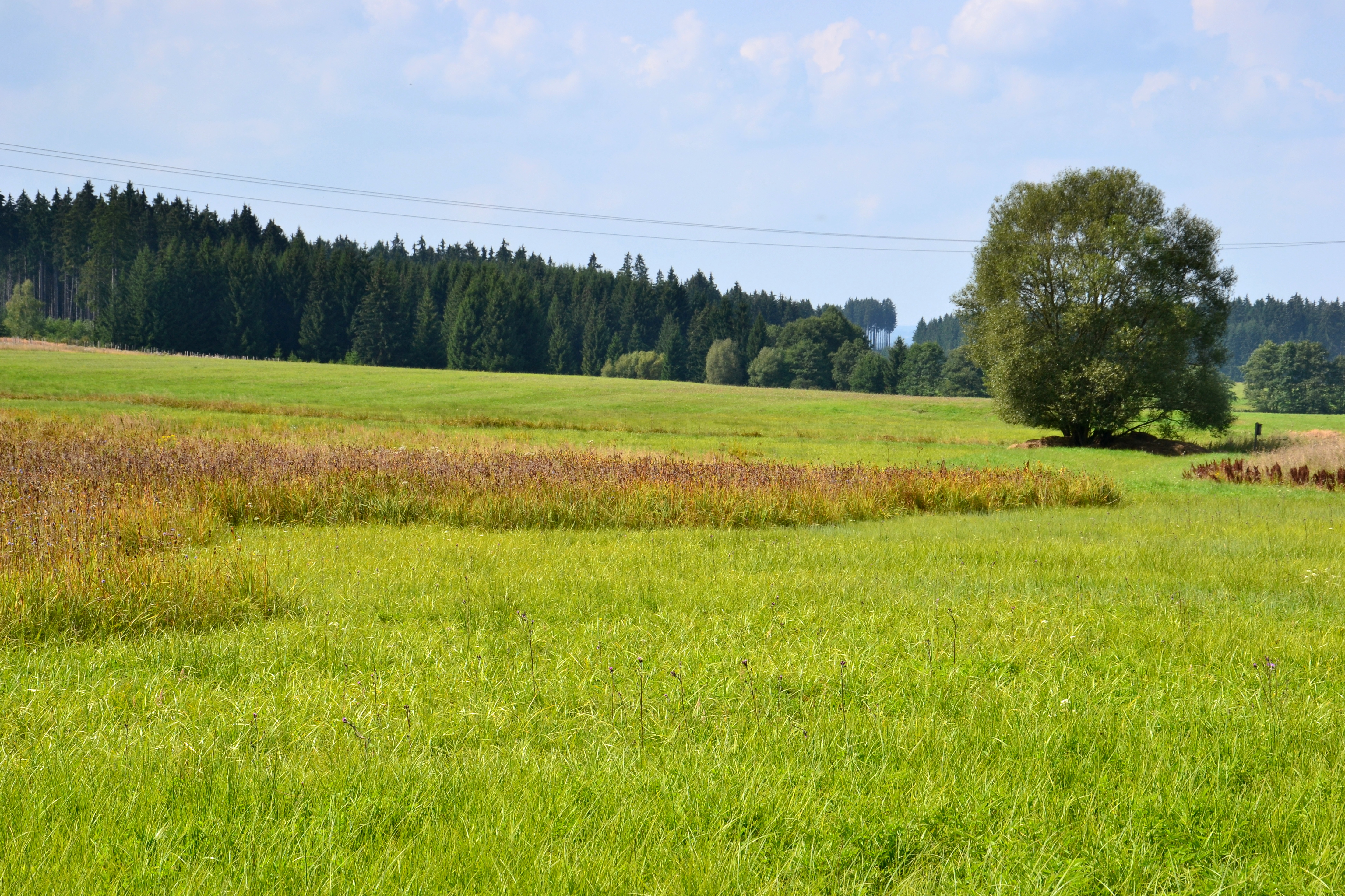 PP Prachomety